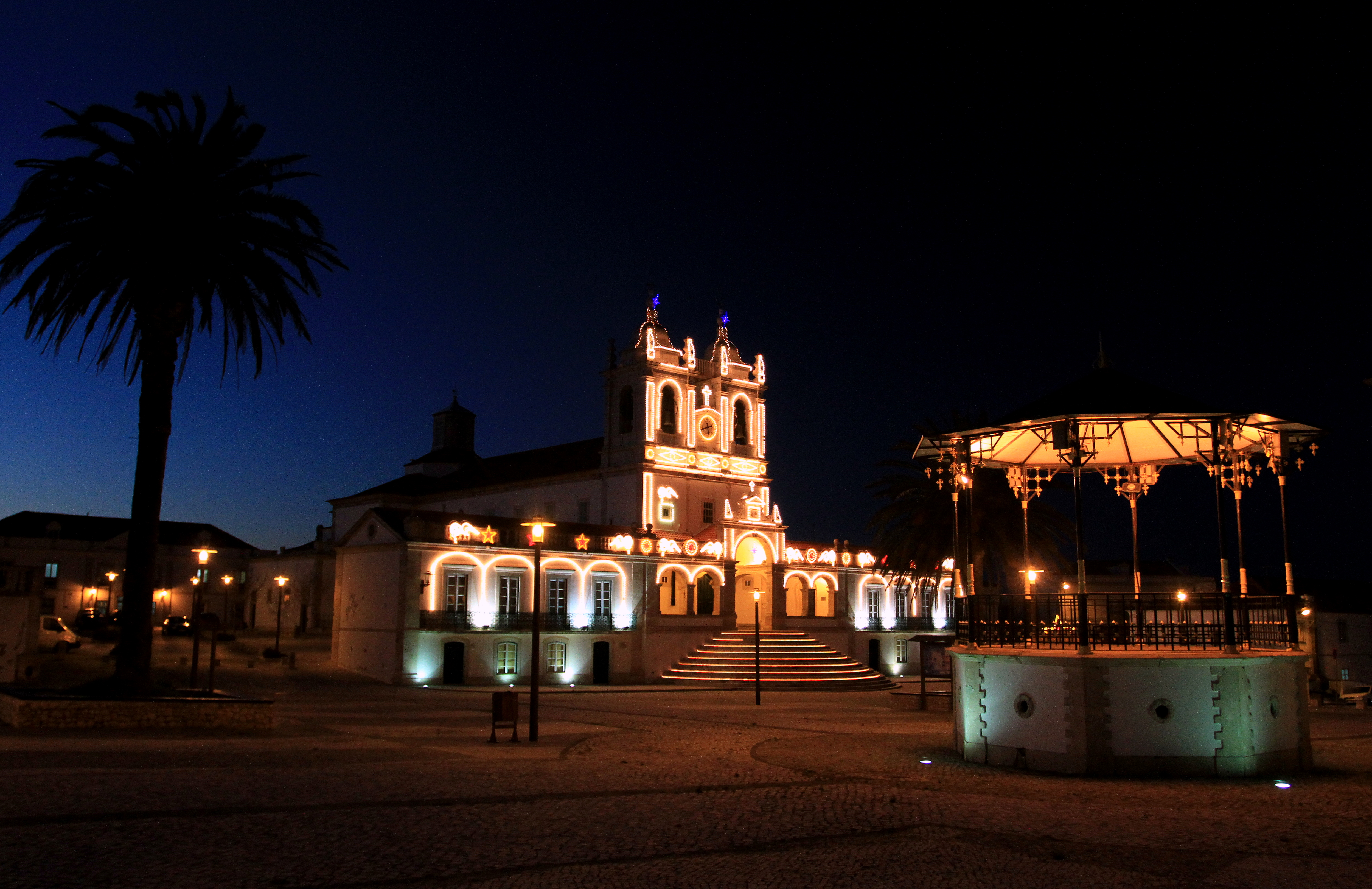 Igreja da N. Sra. da Nazaré This file was uploaded for Wiki Loves Monuments in Portugal with the unique identifier 73955.